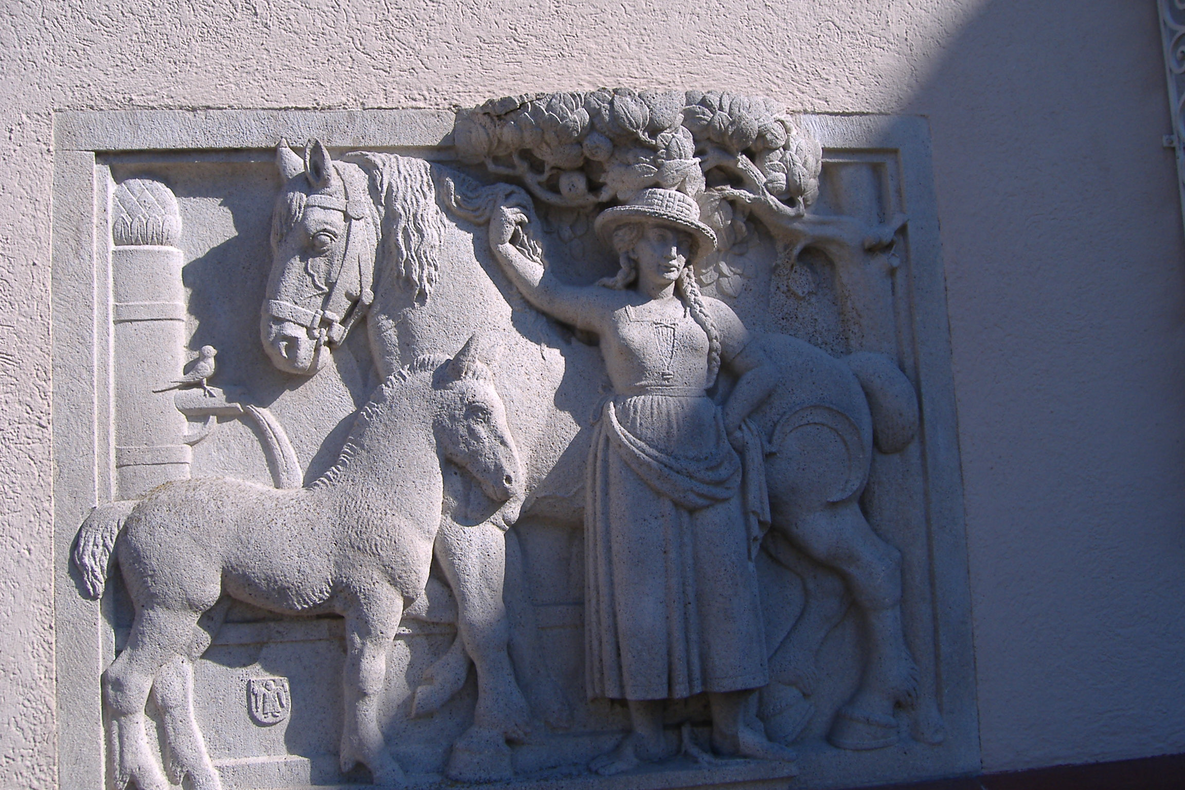 Gut Schwaighof